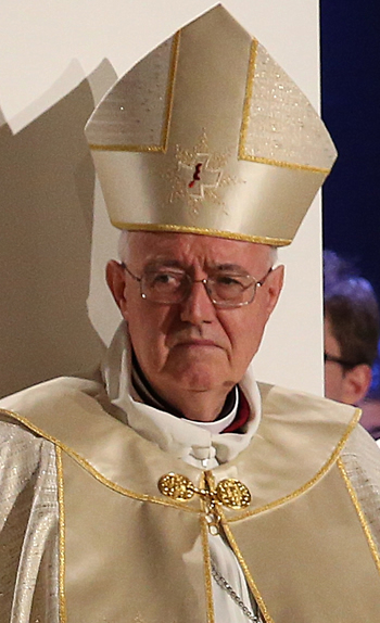 Mons. Cesare Nosiglia - Happening degli Oratori - Sindone 2015 - Visita Papa Francesco a Torino 2015